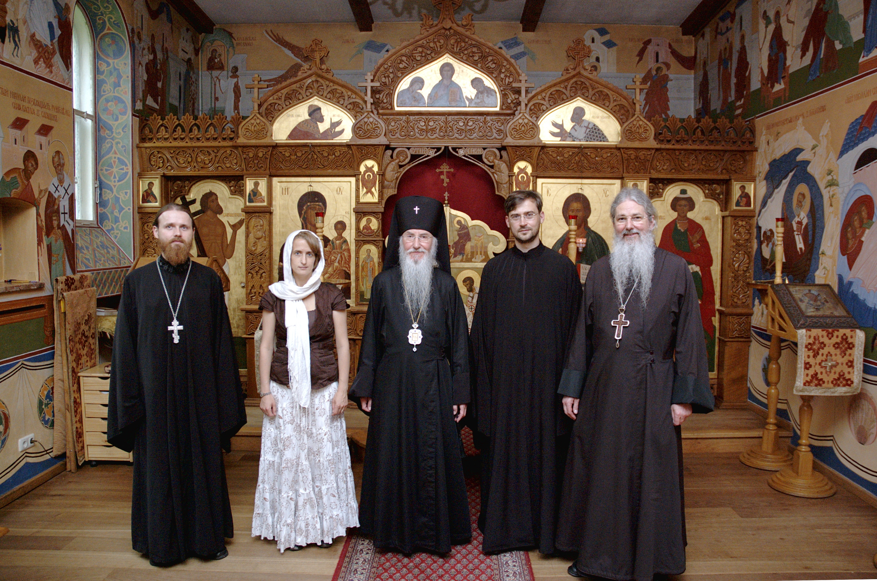 Справа-налево: протоиерей Николай Артемов, диакон Антоний Одайский, архиепископ Берлинско-Германский и Великобританский Марк, Мириам Одайская (супруга отца Антония), священник Максим Массалитин.